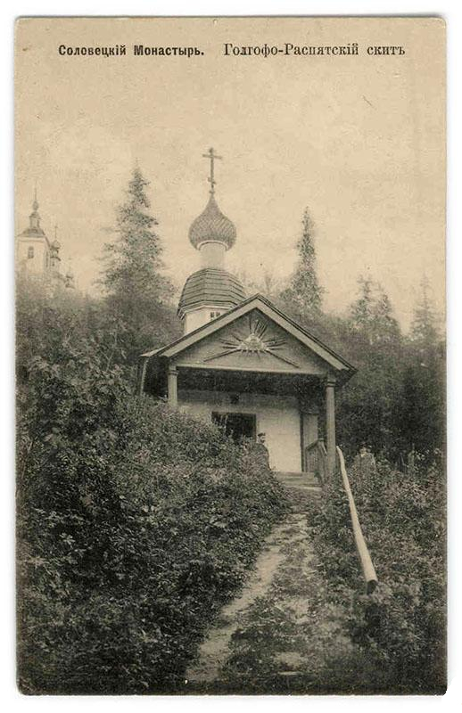 Соловецкий монастырь. Голгофо-Распятский скит. Рерих А. (А.R.М.), Москва.